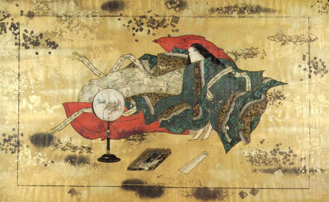 Épisode du Genji-monogatari (détail 4) par le peintre japonais Gukei du XVIIe siècle. Ce détail fait partie d'une suite de 31 scènes. La hauteur est de 35 centimètres, la longueur n'est pas définie. Cette scène réalisée au XVIIe siècle, est conservée à la Galerie Janette Ostier, Paris.